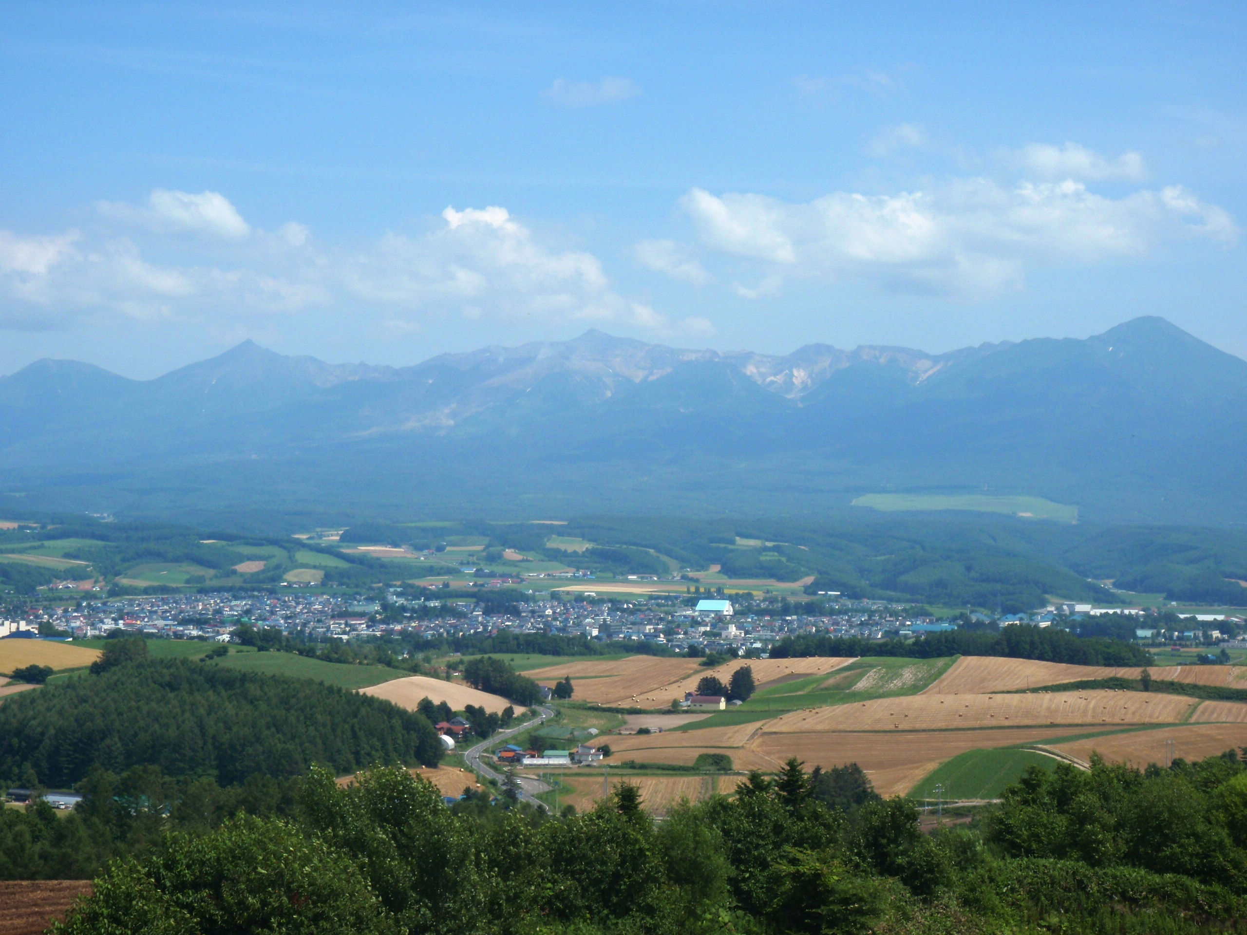 千望峠から見下ろす上富良野市街地と十勝岳連峰